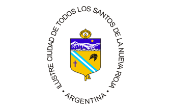 Bandera del Departamento Capital, Provincia de La Rioja, Argentina.